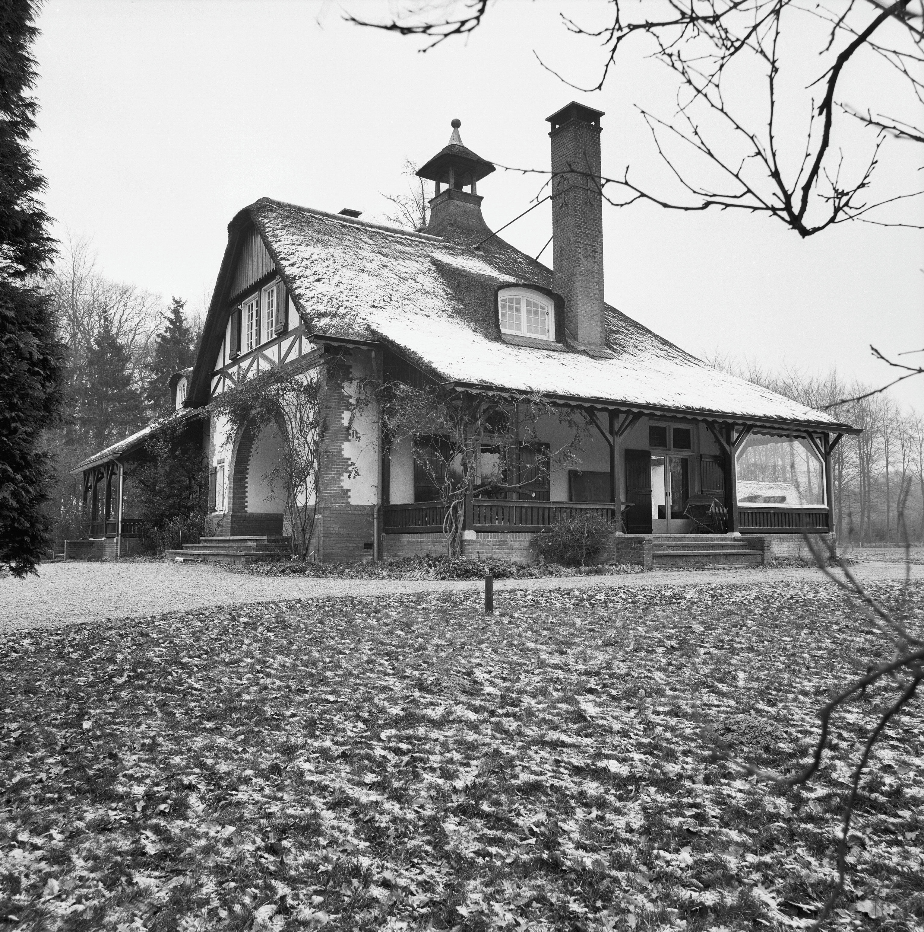 De Borg: Noordgevel rietgedekte villa, met veranda, tuin rondom